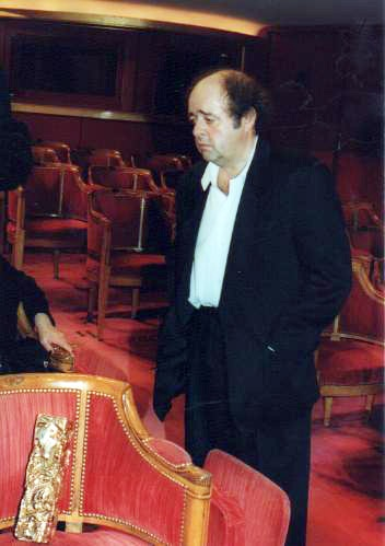 Jacques Villeret à la cérémonie des Césars 1999